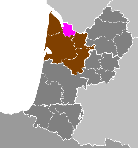 Maps of arrondissements and cantons of France: Département de la Gironde - Arrondissement de Blaye.PNG (Région Aquitaine)